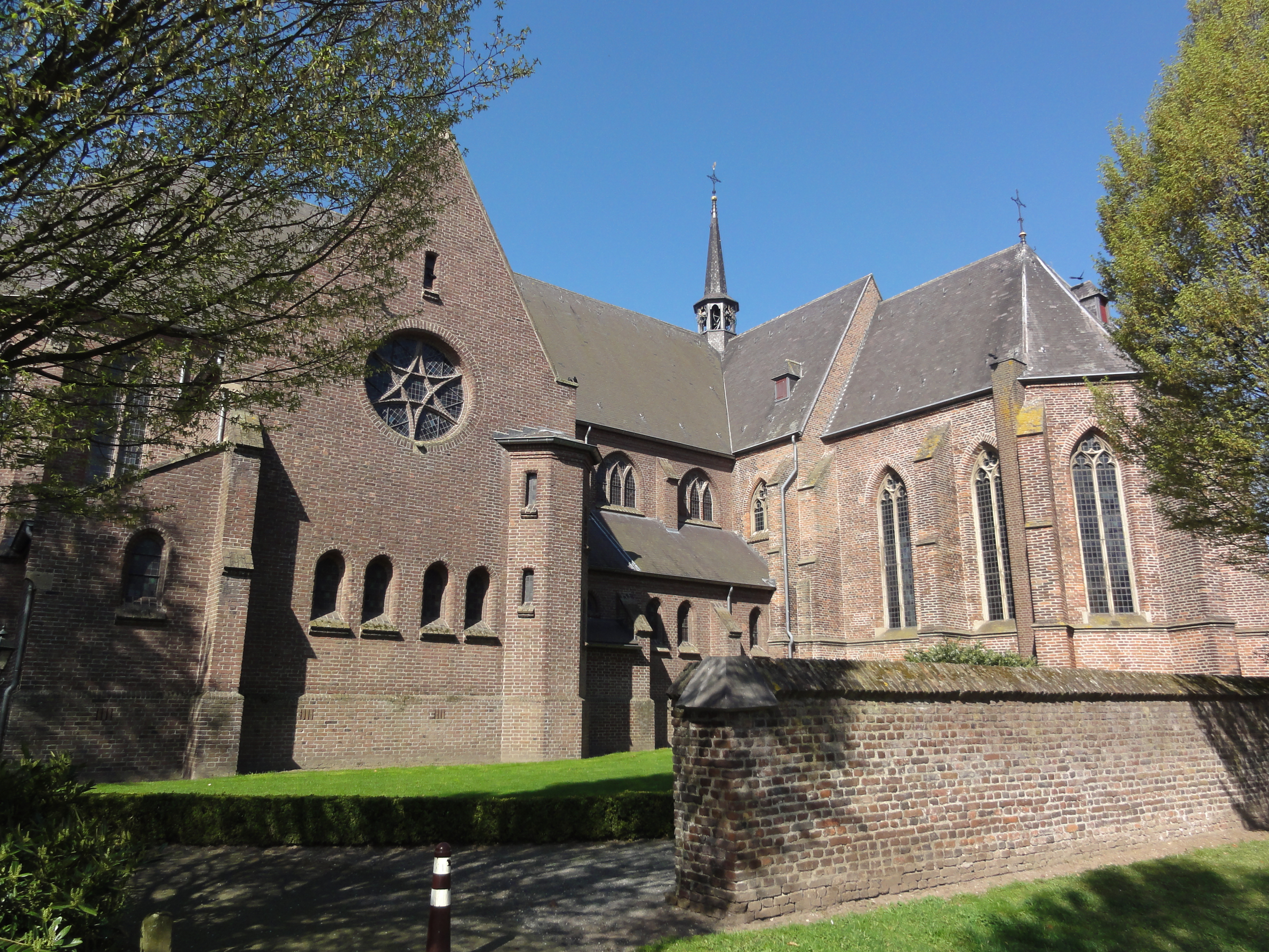 Venray Oostrum, L.V. kerk twee beuken van de kruisvorm